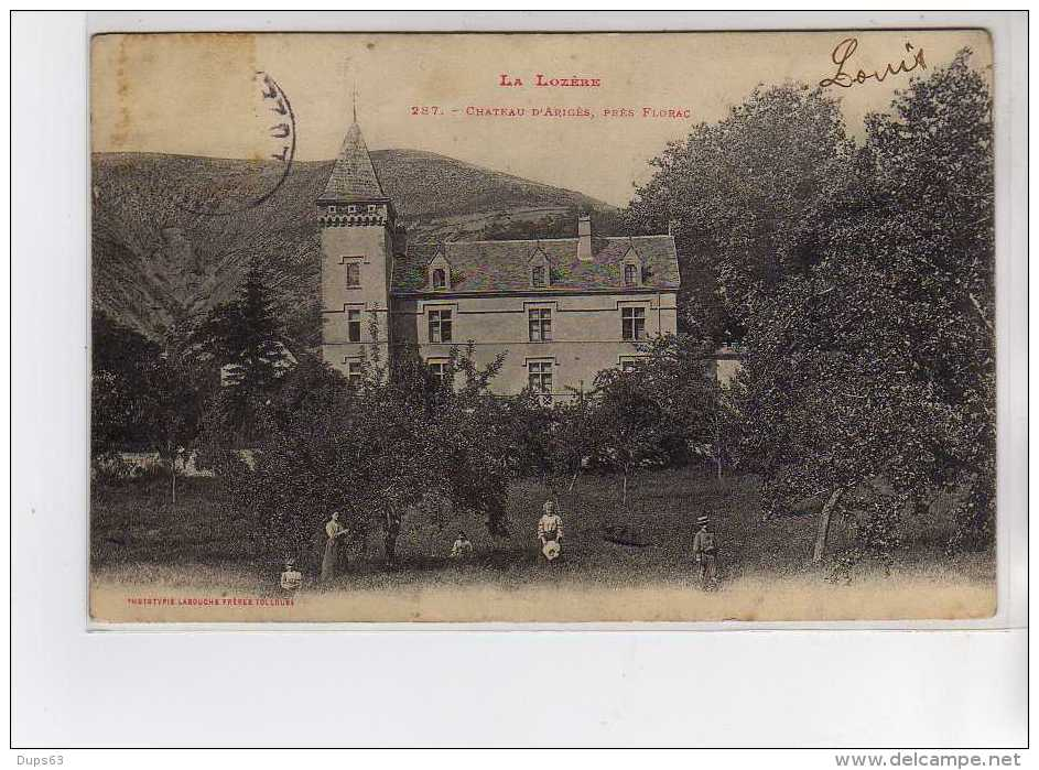 Les prés d'ariges au début du XXème